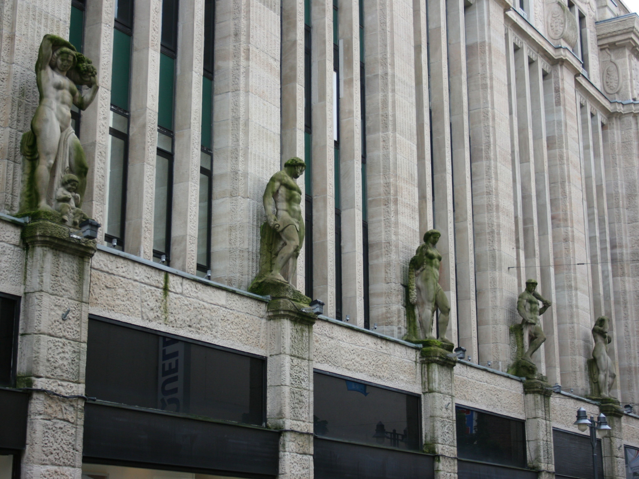 Kaufhof in Wuppertal-Elberfeld